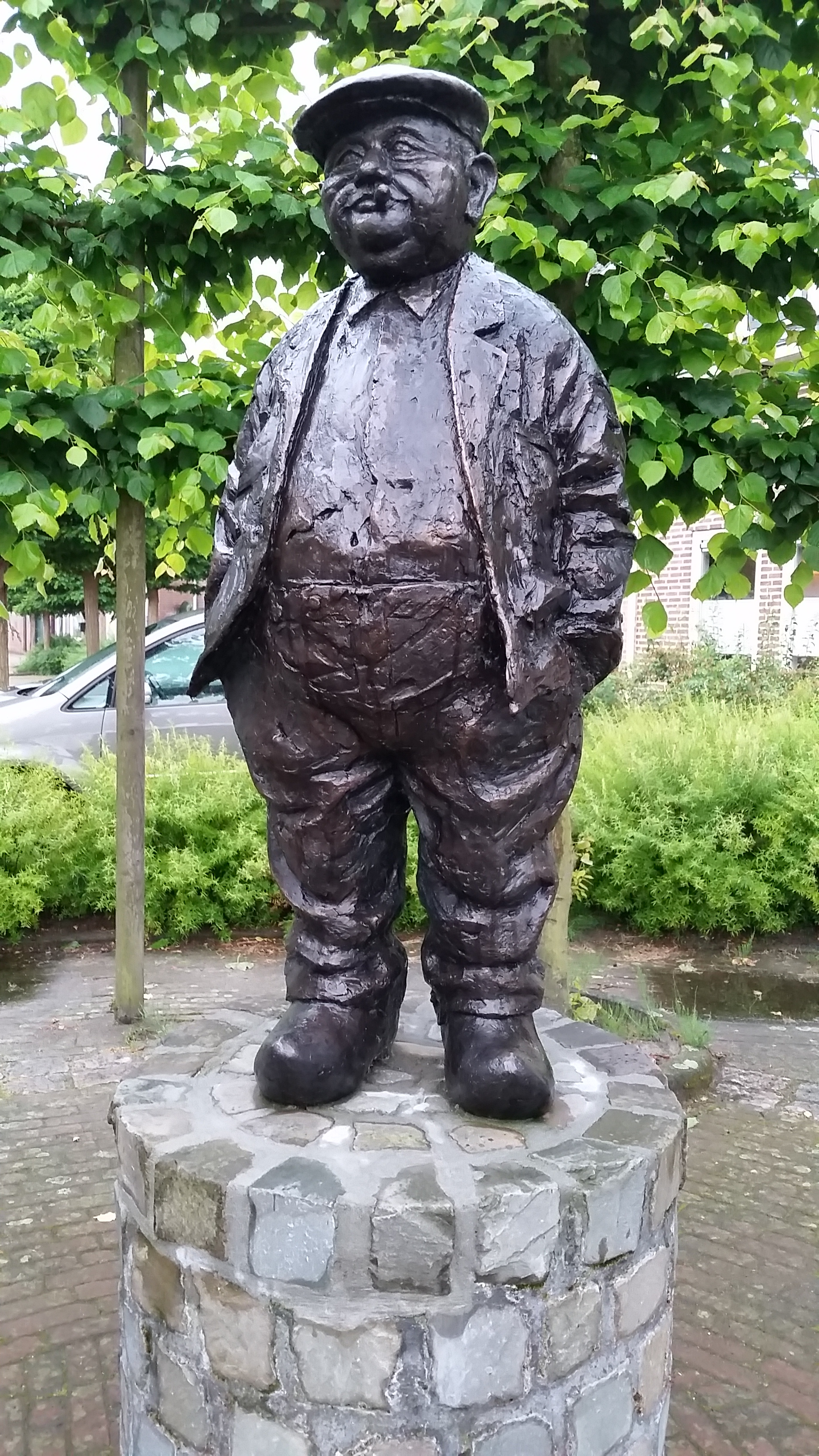 Papboer Wouw, Beeld "De Wouwse Boer" Leon Vermunt